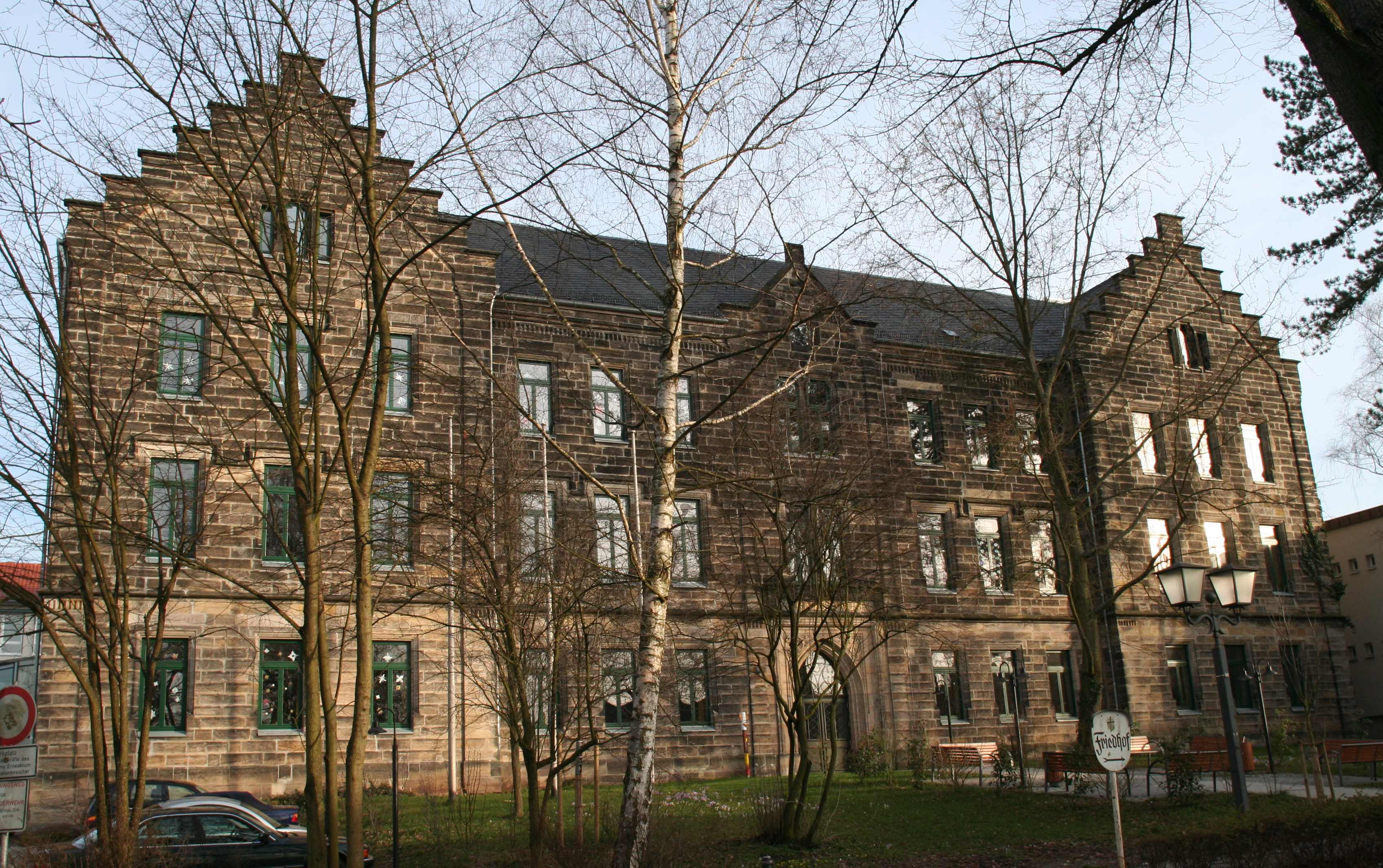 Gymnasium Ernestinum Coburg